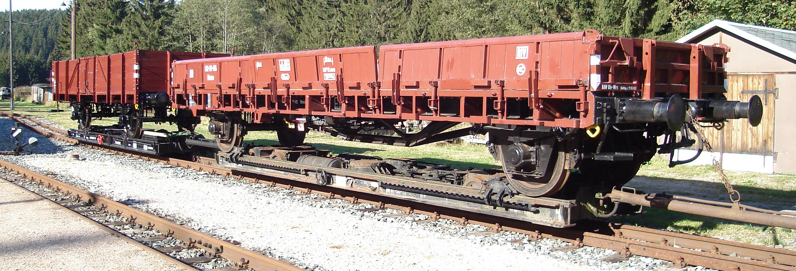 Rollwagen mit 8,00 m (links) und 9,00 m Fahrbühnenlänge in Schönheide Spd